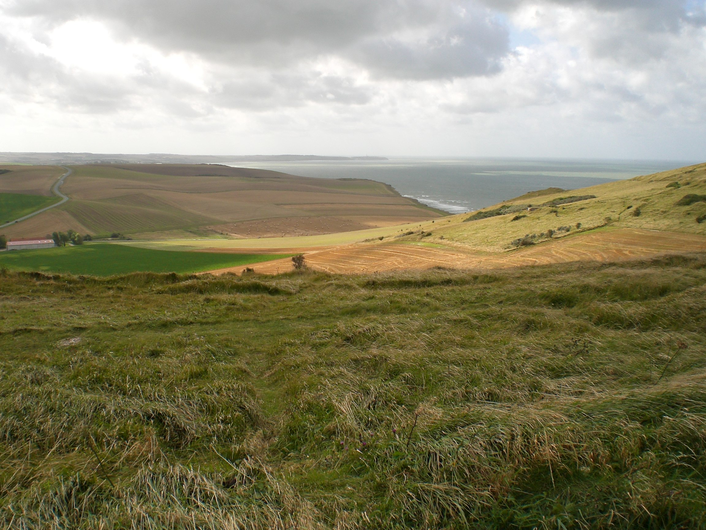 Paysage des terres et du plateau du Cap Blanc-Nez à Escalles dans le Pas-de-Calais, à 10km de la ville de Calais. Le Cap Blanc-Nez est la falaise la plus septentrionale de France. Au loin on distingue le Cap Gris-Nez.